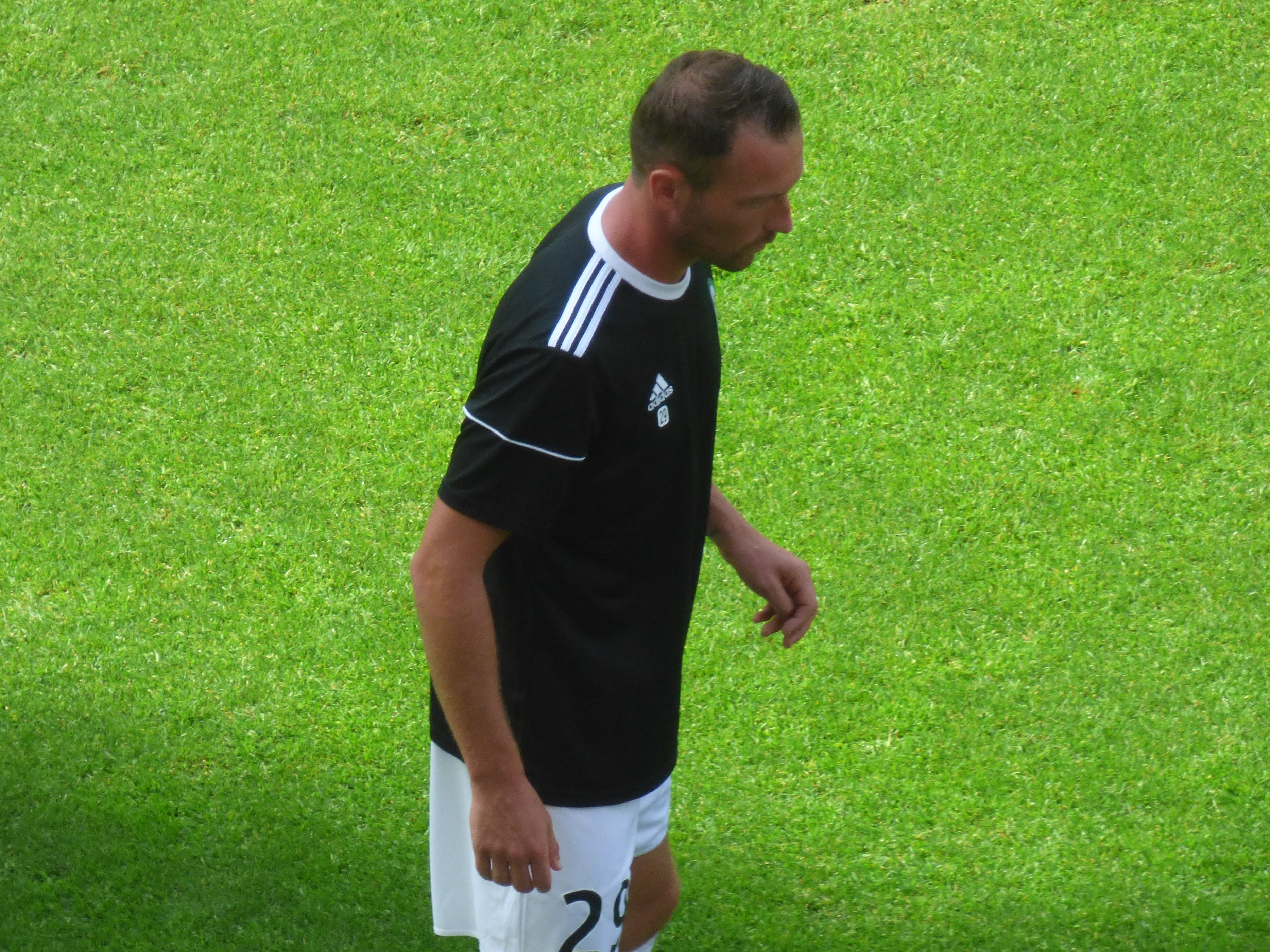 Matthieu Fontaine avant le match RC Lens / Red Star, comptant pour la deuxième journée du championnat de France de Ligue 2 2018-2019 au Stade Bollaert-Delelis, le 4 août 2018.